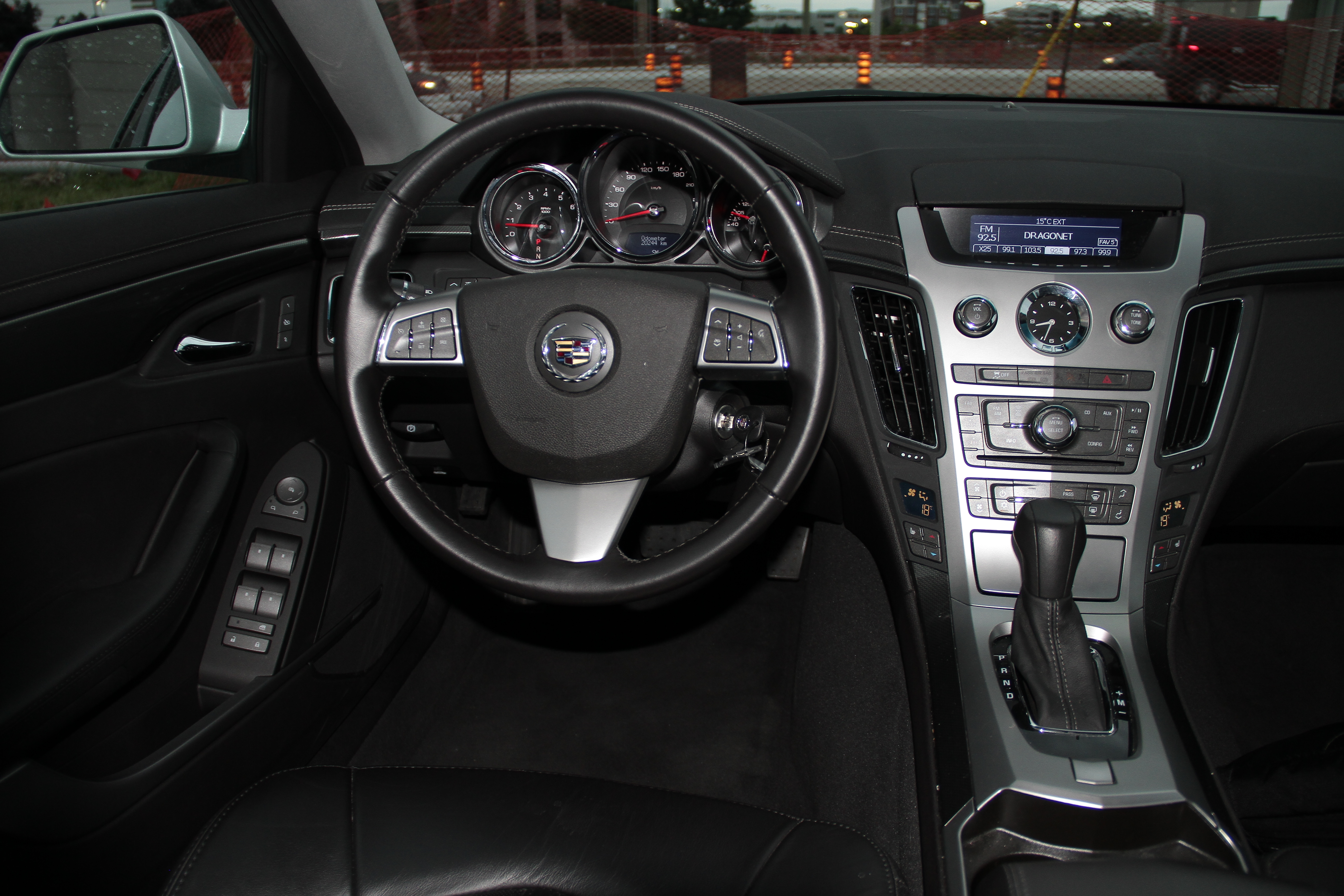 Кадиллак CTS